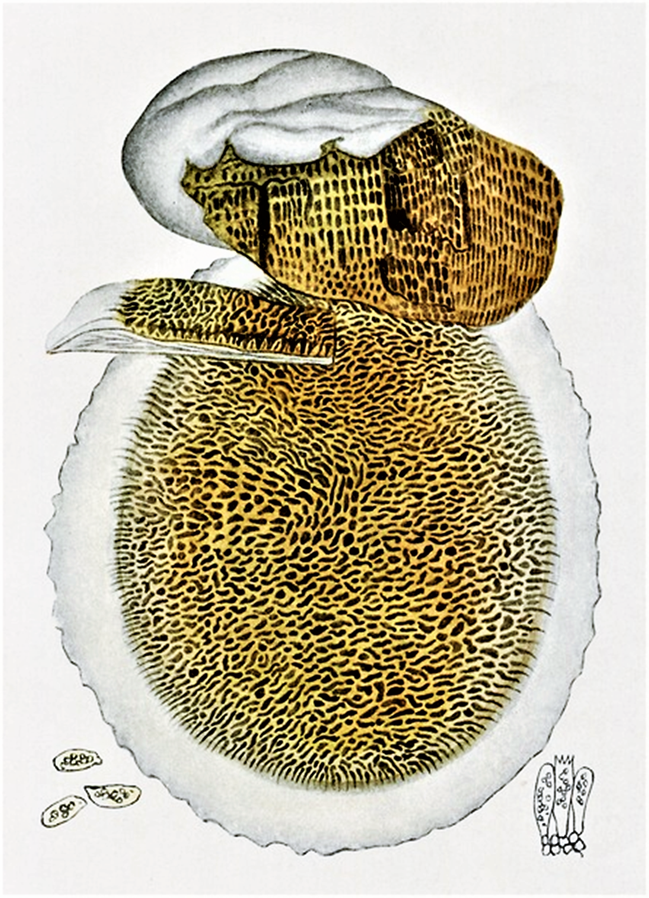 Giacomo Bresadola: Merulius lacrimans Wulfen (1781), heute: Serpula lacrymans (Wulfen) P.Karsten (1884)